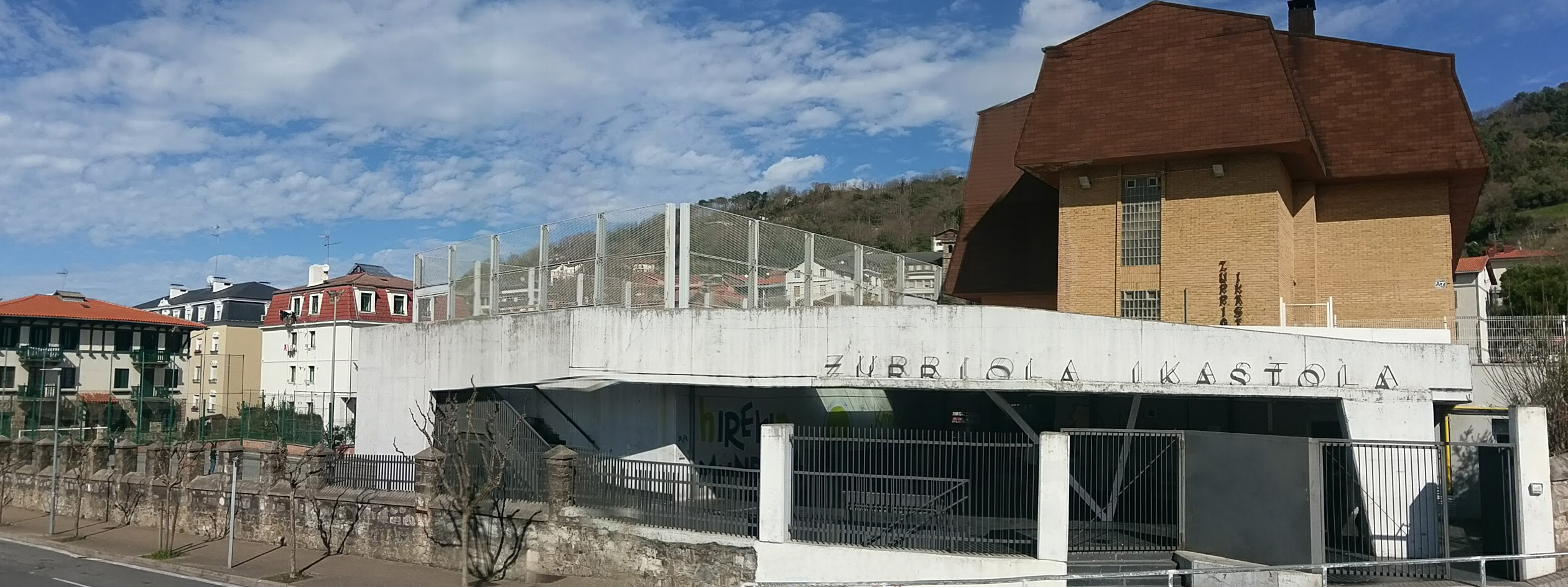 Zurriola Ikastola - Hurra eraikina